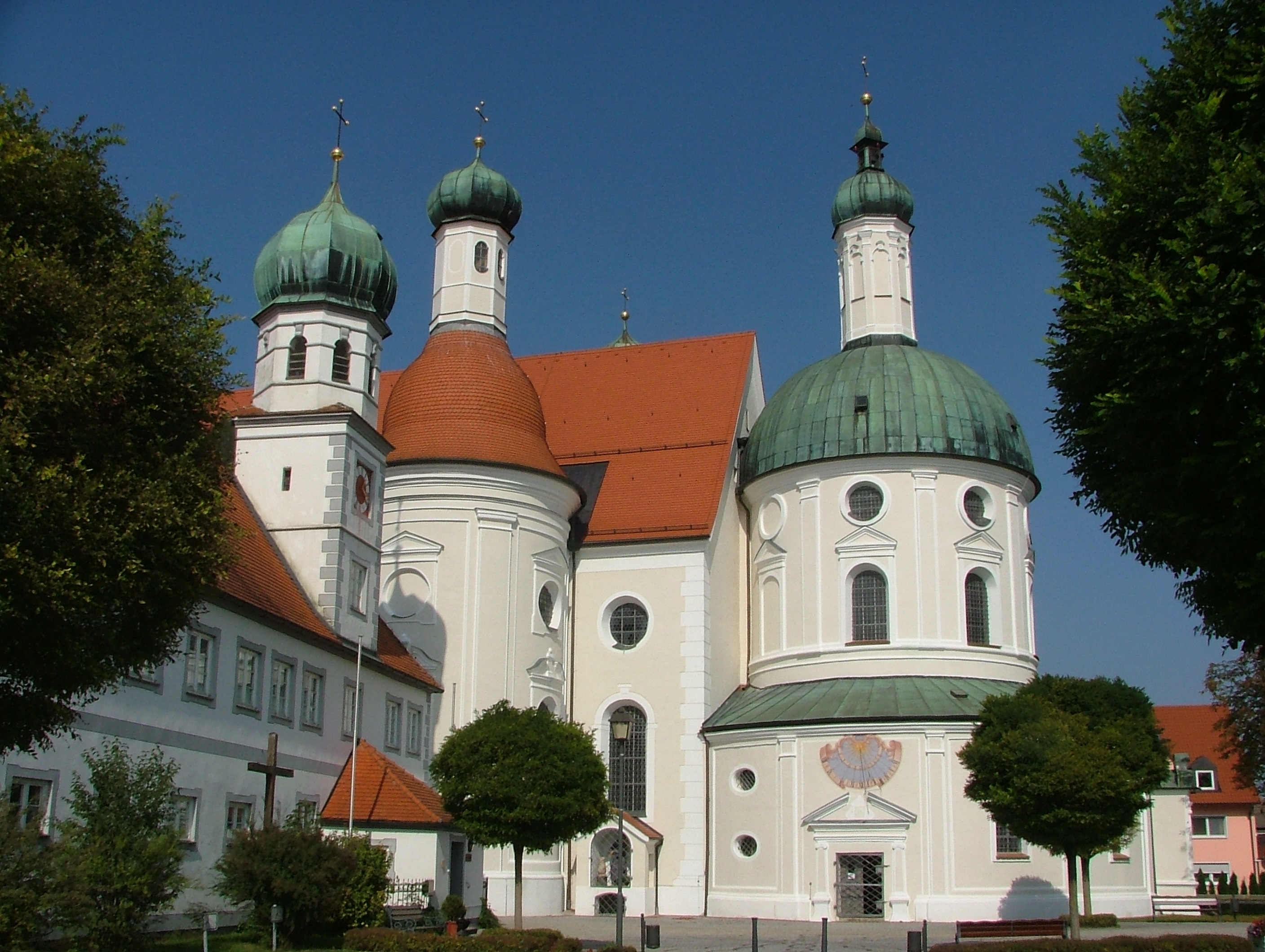 Wallfahrtskirche Maria Hilf, Klosterlechfeld